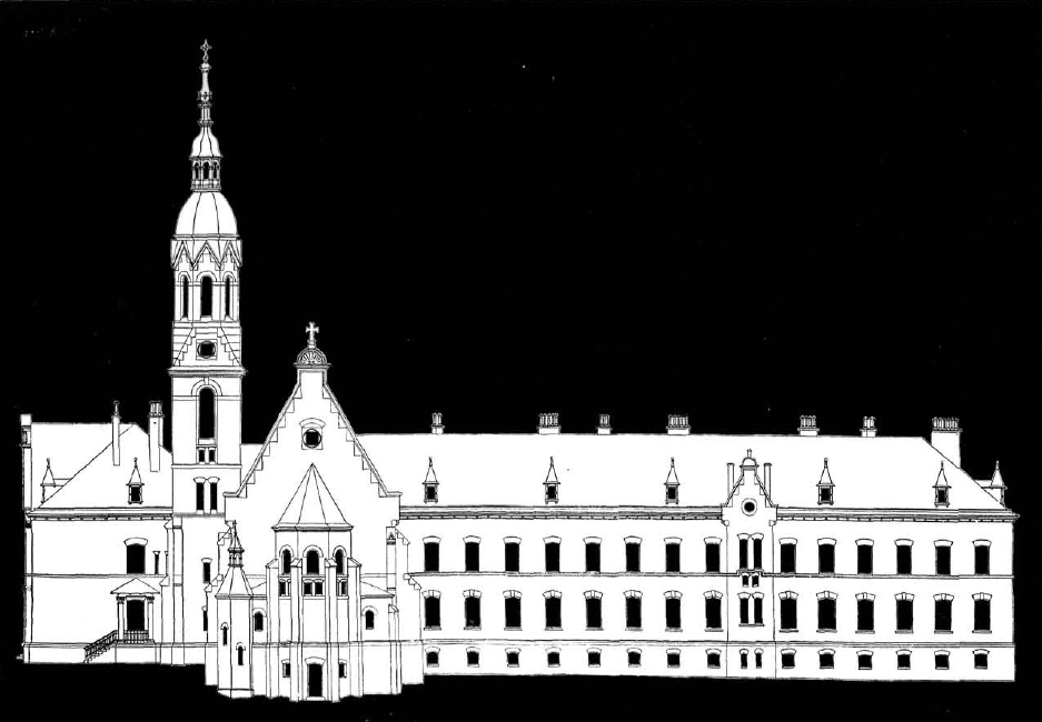 Монастир сестер Матері Божої Милосердної у Кракові. Проект Кароля Заремби.